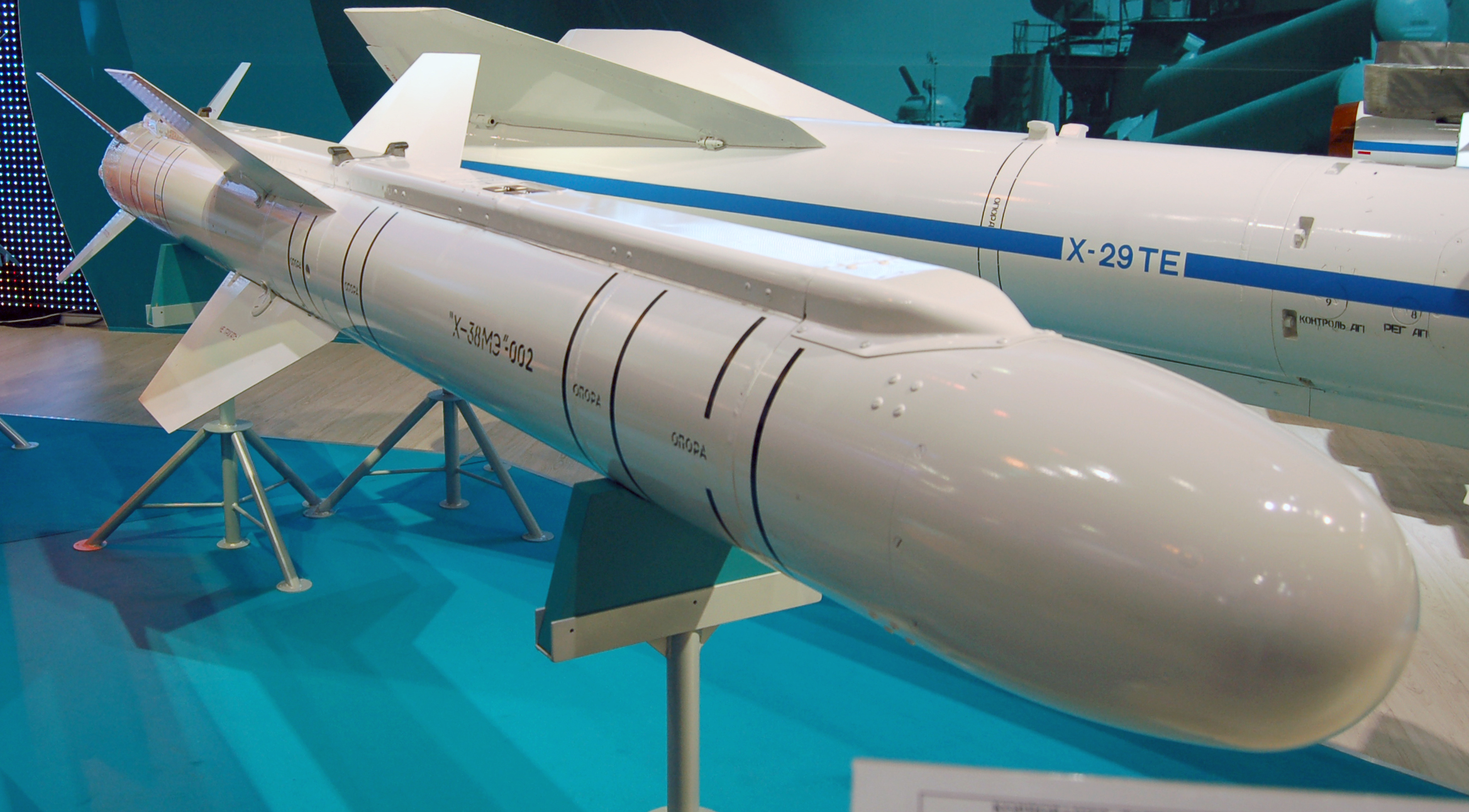 Ракета "воздух-поверхность" корпорации Тактические Ракетные Вооружения. МАКС-2009